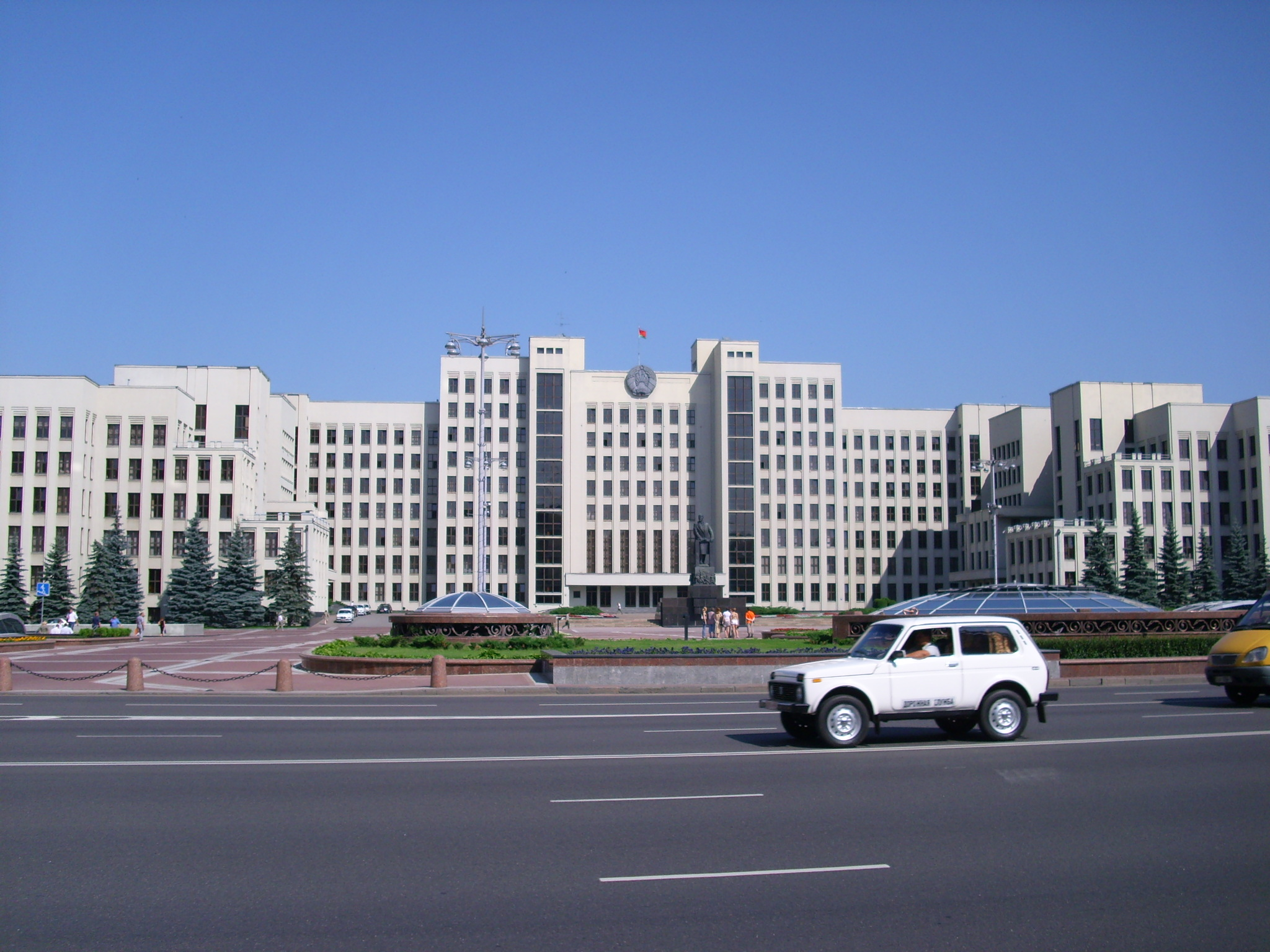 Palais du gouvernement de Biélorussie